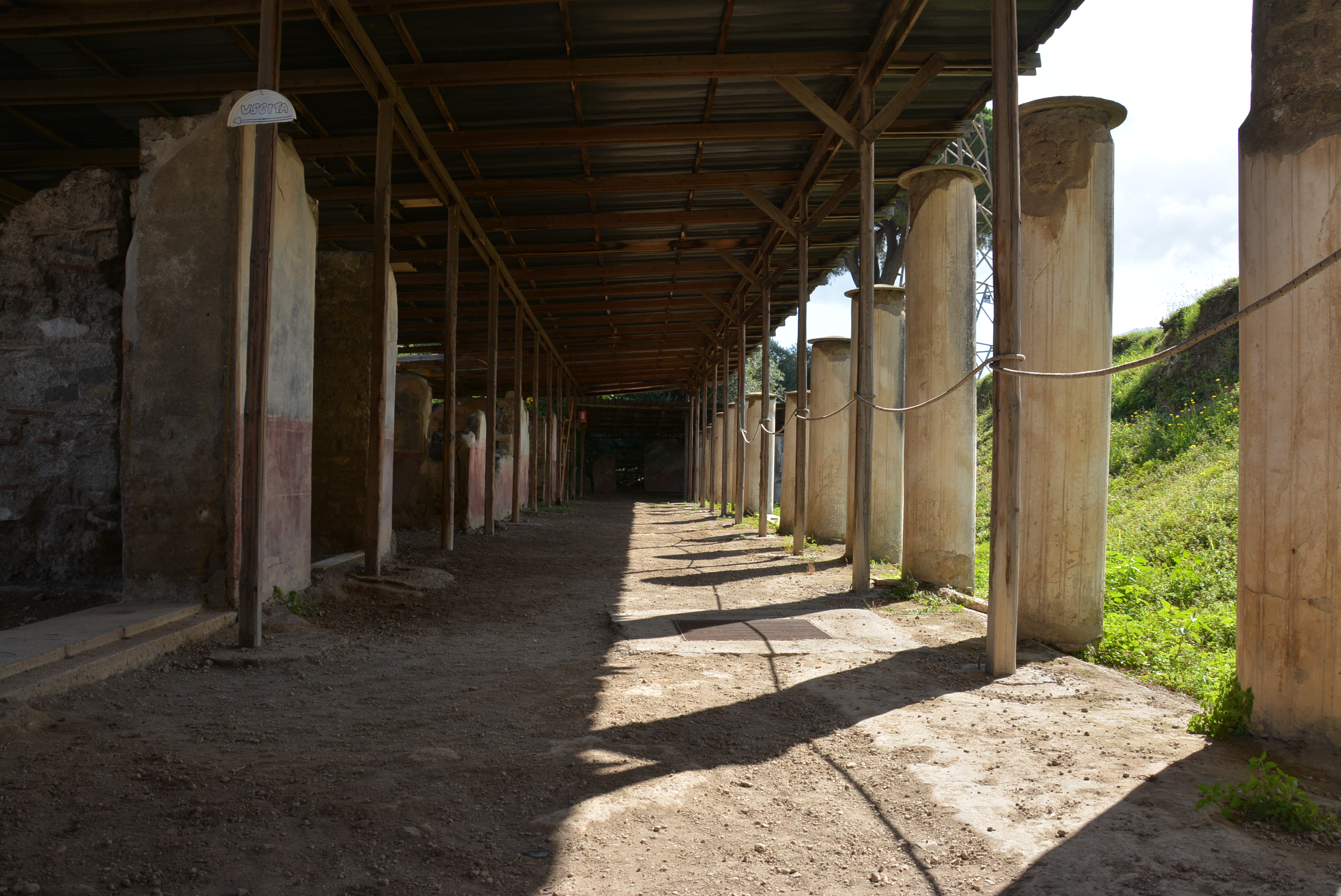 Secondo Complesso, Stabia - MIBAC This is a photo of a monument which is part of cultural heritage of Italy.